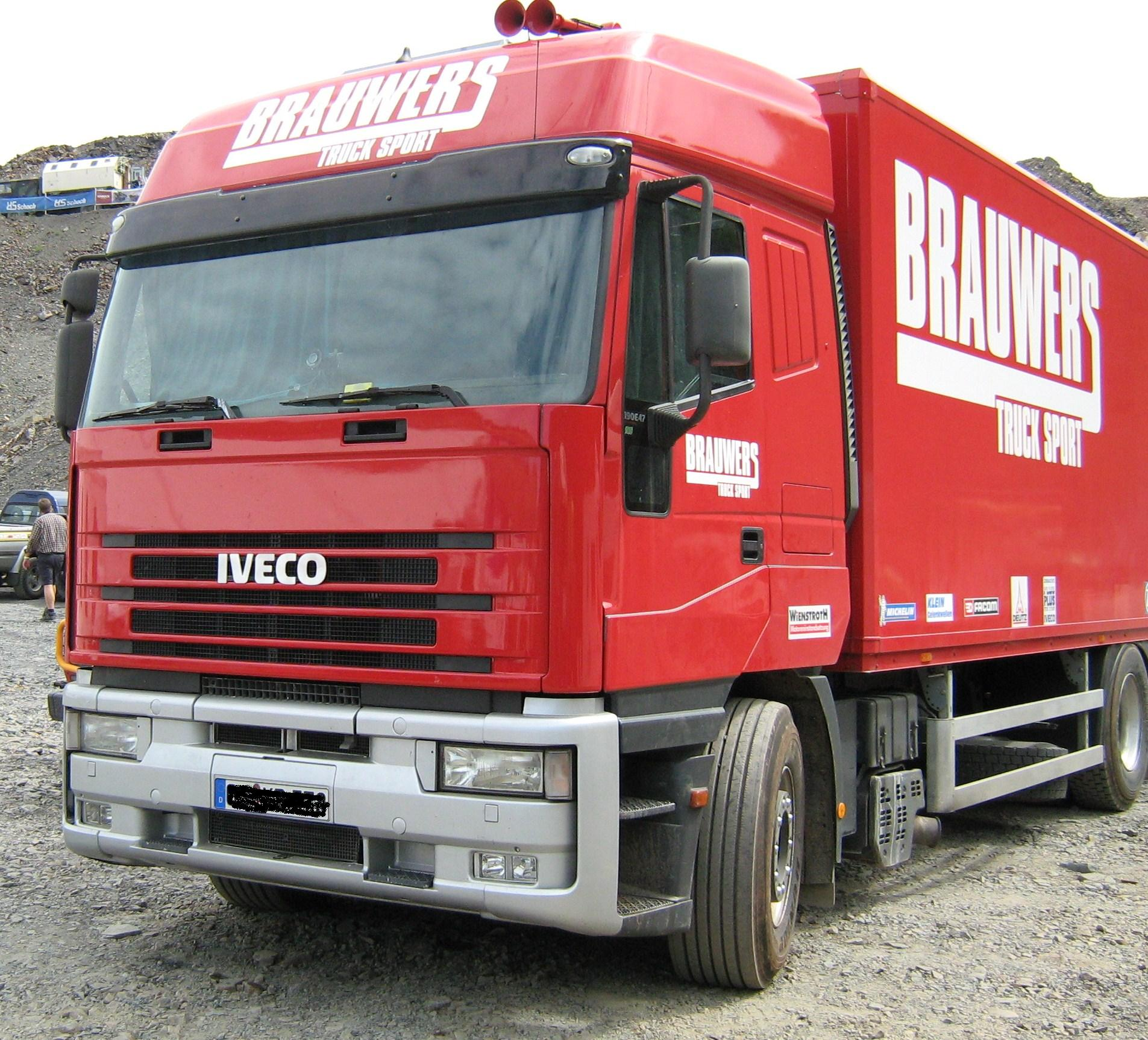 LKW Iveco EuroStar, Bj. ab 1990